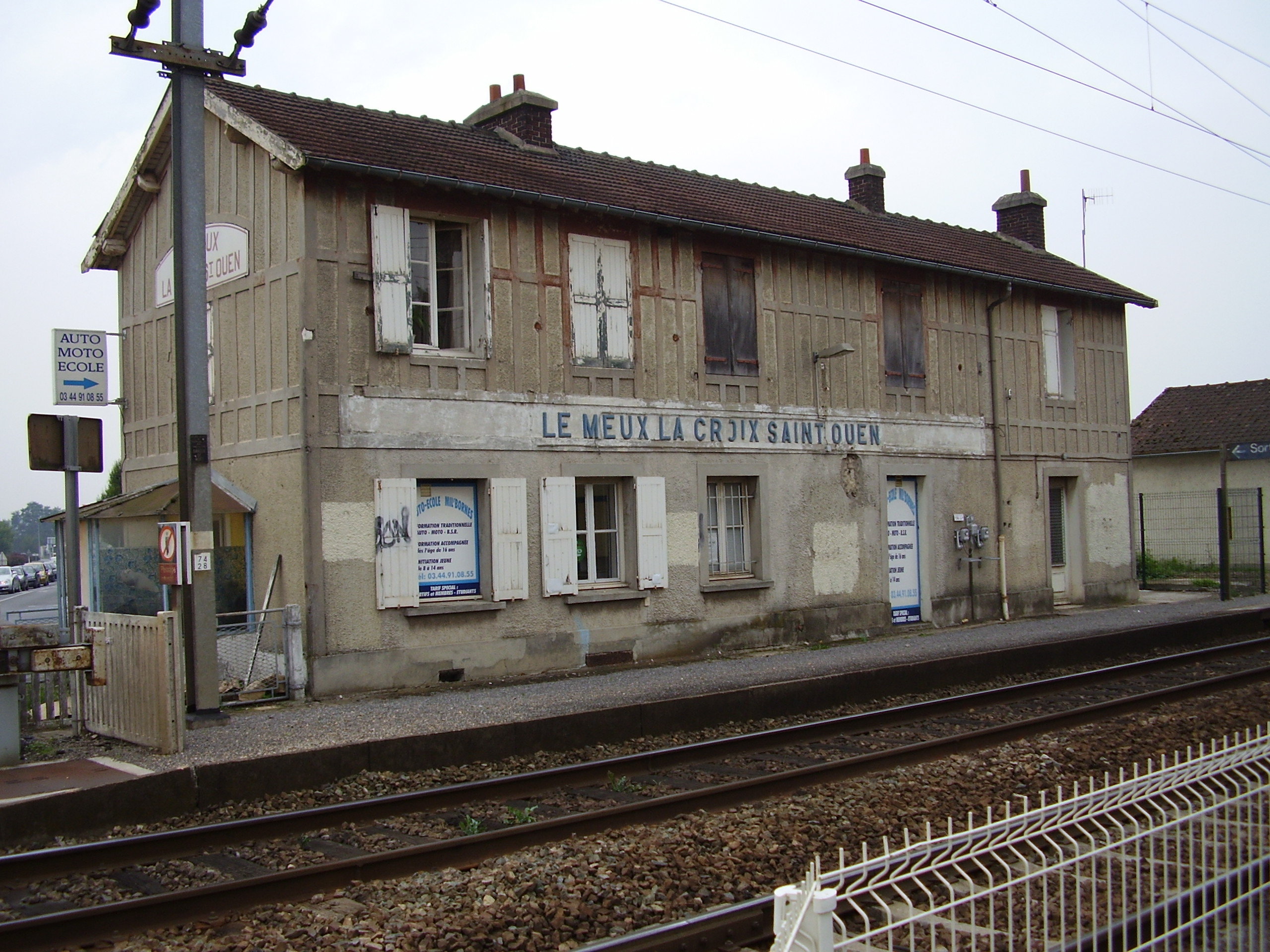 Vue de la gare du Meux - La Croix-Saint-Ouen, côté voies.